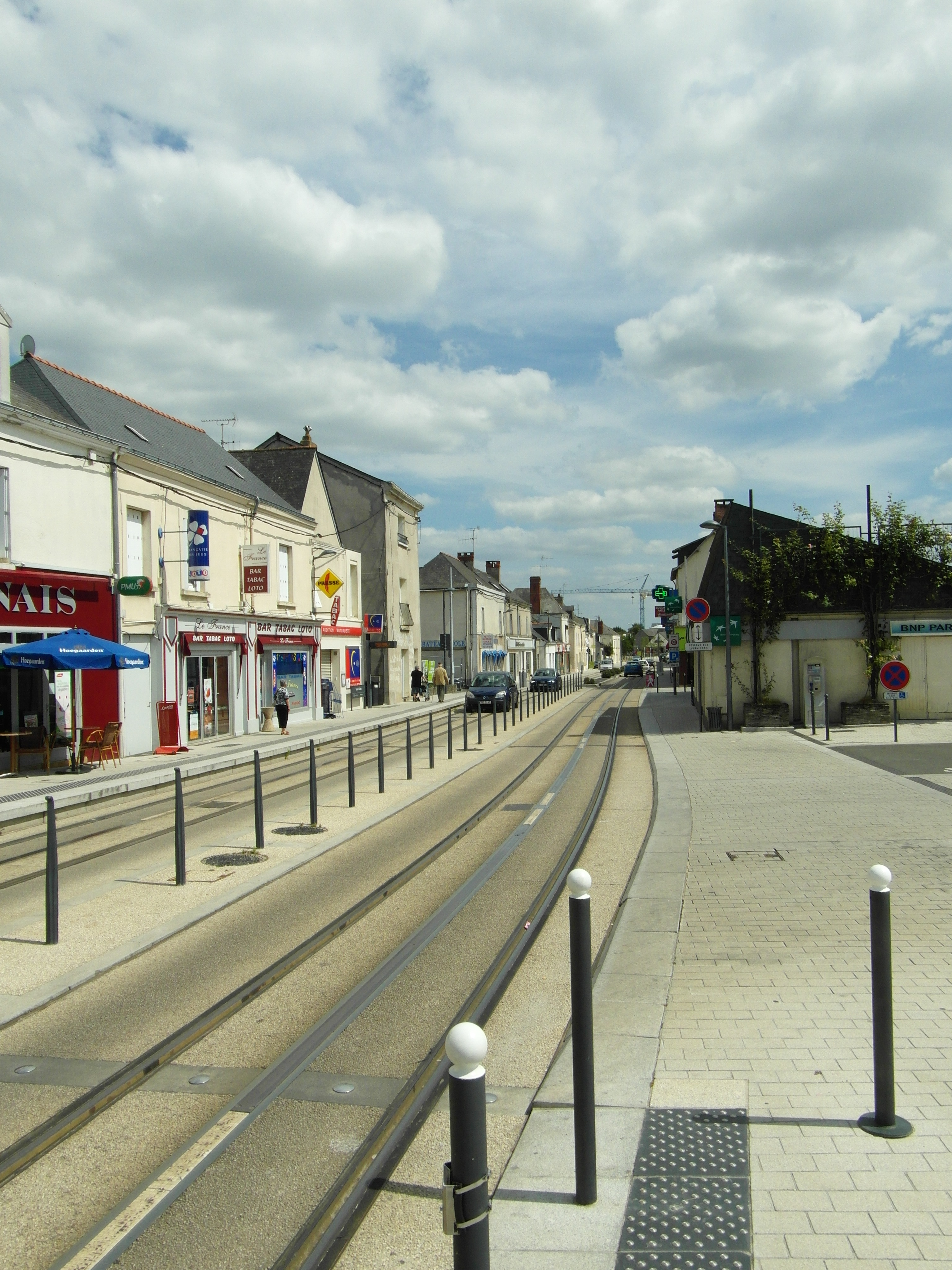 Straßenbahn Angers - Städtebaulcihe Integration im Abschnitt Avrillé